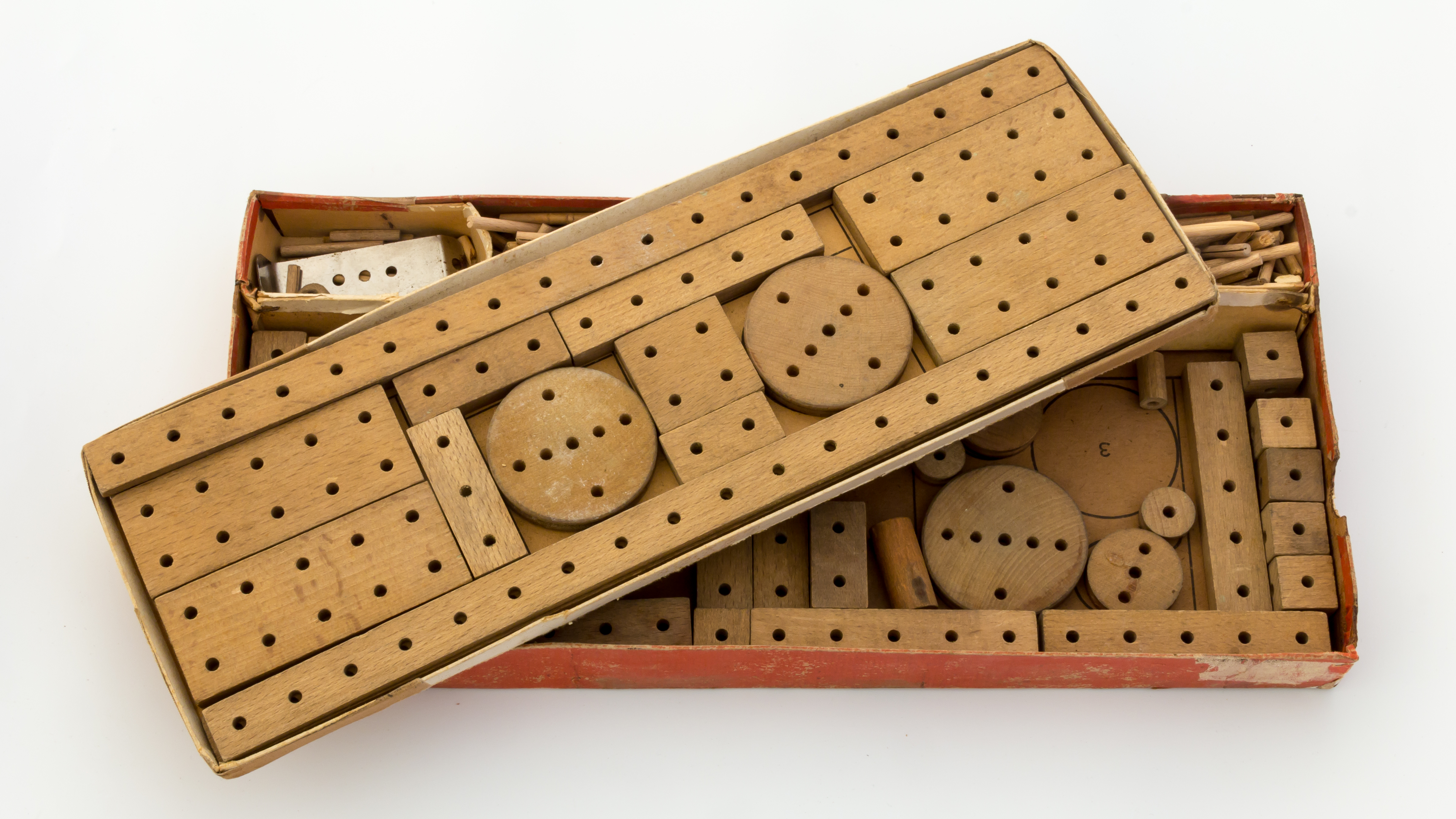 Matador-Holzbaukasten